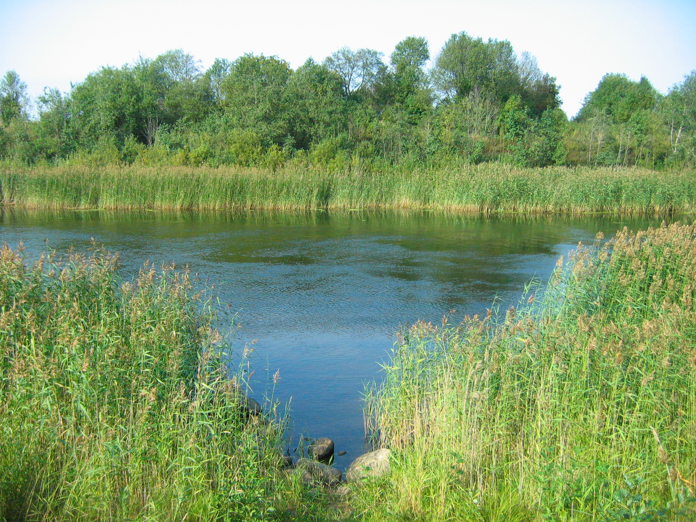 novoladojsky kanal